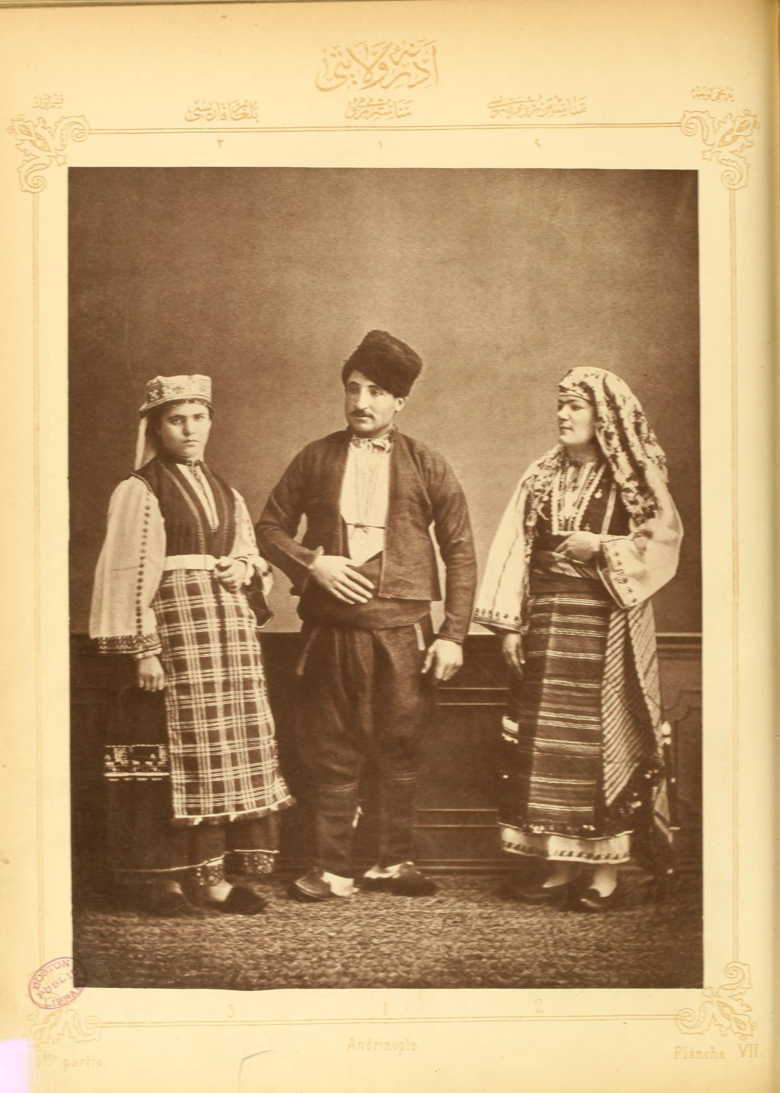 VILAYET D'ÈDIRNÈ (andrinople) PLANCHE VII: Paysan grec de Manastir Paysanne g-recque de Manastir Femme bulgare de Scutari